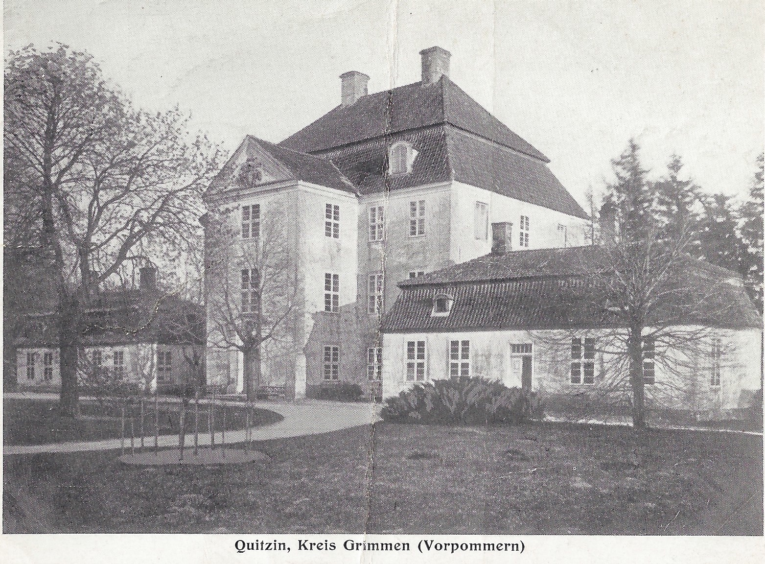 Postkarte vom Jagdschloss Quitzin, 19. Jhd.